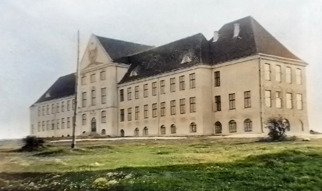 Pokolorowana oraz odnowiona fotografia z lat 30 nieznanego autora przedstawiająca budynek główny ówczesnego gimnazjum a obecnie Liceum im. Bartosza Głowackiego w Tomaszowie Lubelskim. Oryginalna fotografia znajduje się w zbiorach Muzeum Regionalnego im. dr. Janusza Petera w Tomaszowie Lubelskim.